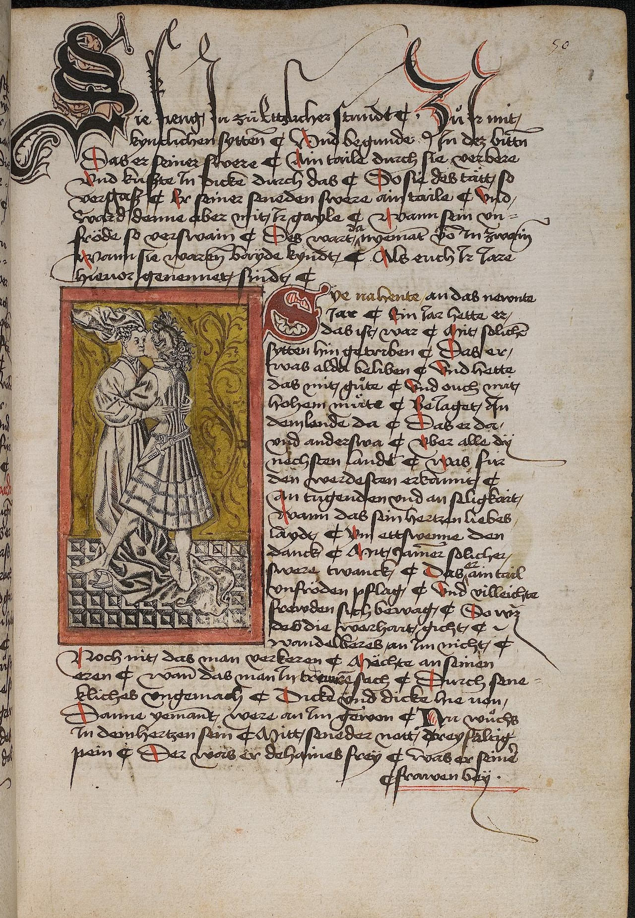 Codex Palatinus germanicus 4, Blatt 50r der Handschrift: "Rudolf von Ems, Willehalm von Orlens"; ausgeschnittener und eingeklebter Kupferstich: sich umarmendes Liebespaar